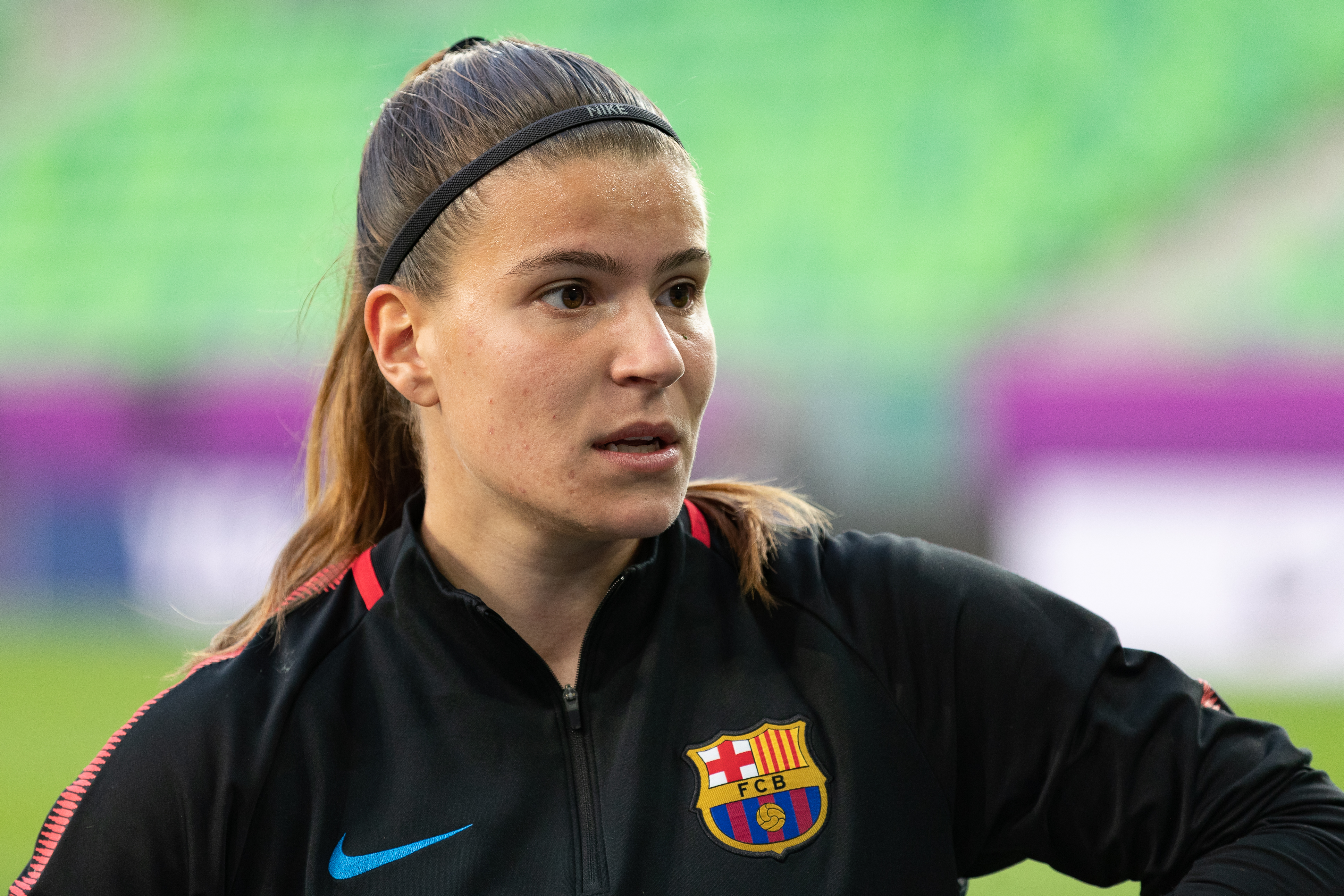 Gemma Font (FC Barcelona, 25, Torwart, goal keeper) beim Abschlusstraining